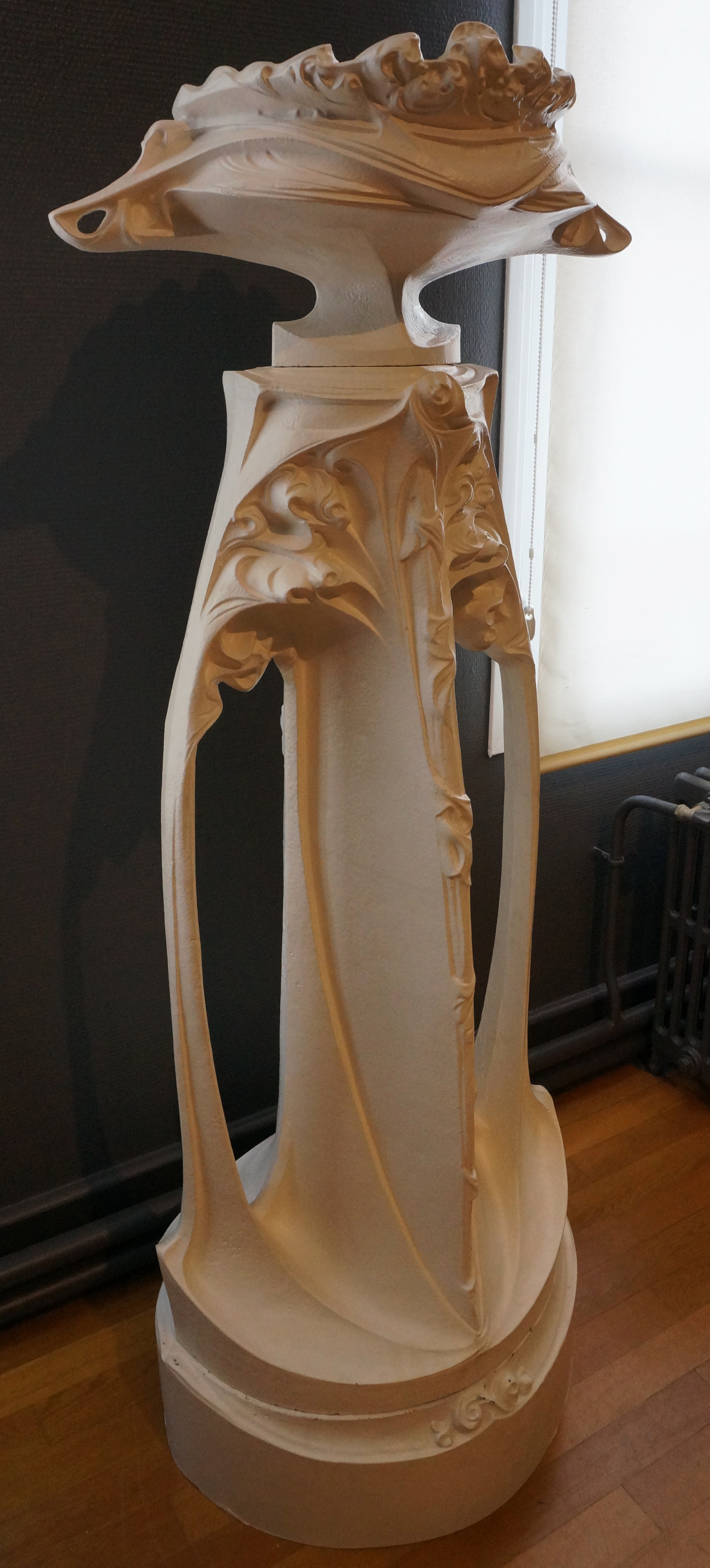 Art Nouveau (Hector Guimard) — Présenté au Musée Fonte d'art Saint-Dizier.